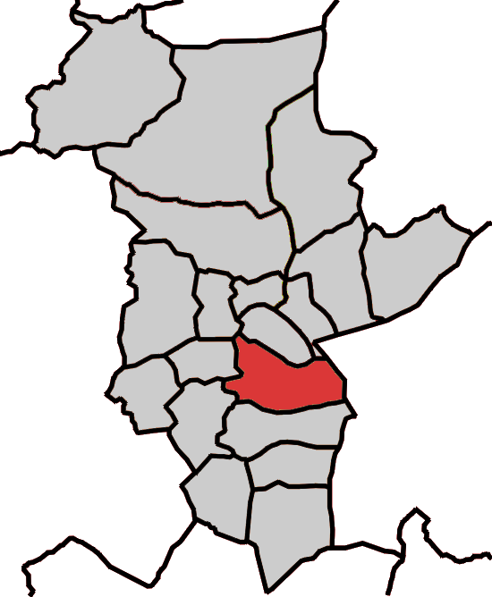 Situación da parroquia de Abeledo no concello de Abadín